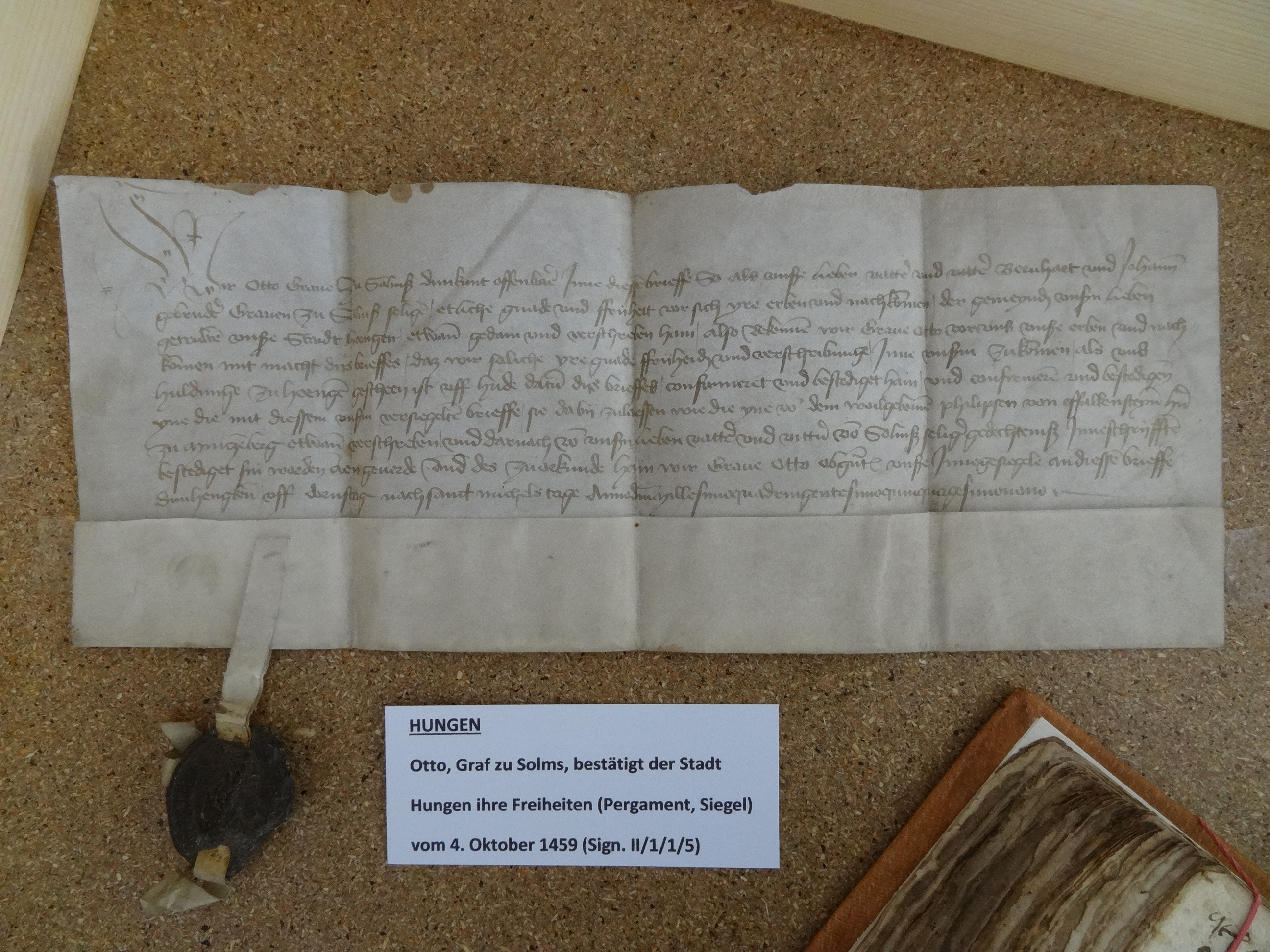 Stadtarchiv Hungen